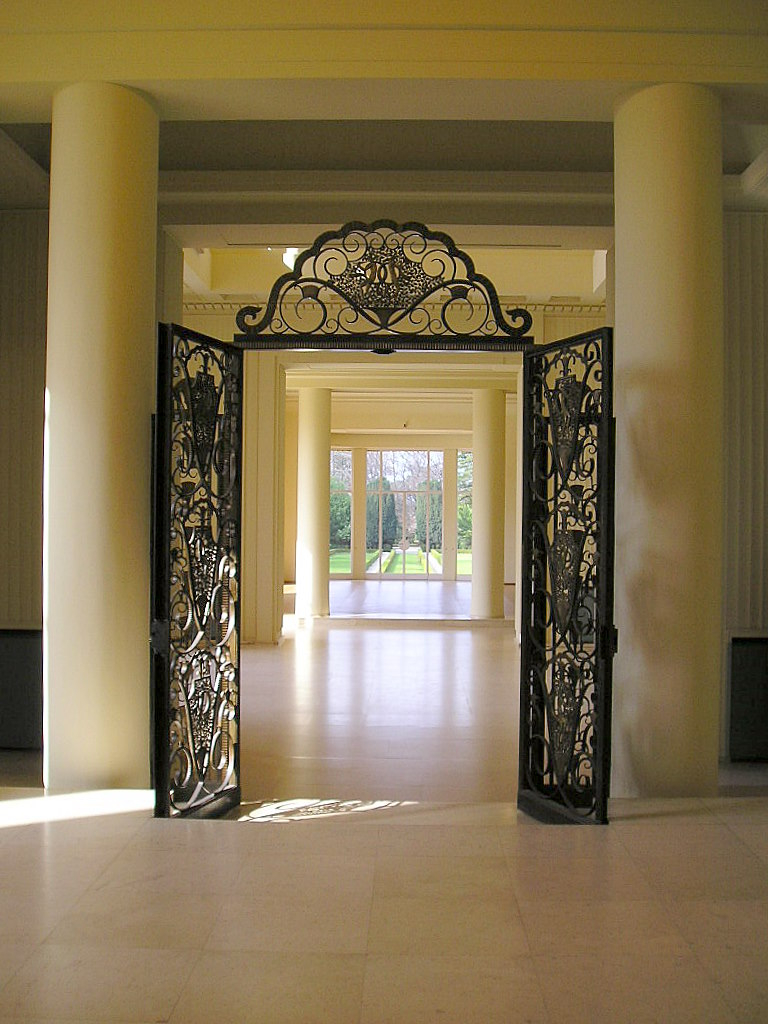 Um exemplo de gostos antigos e de dinheiros não tão desusados quanto isso. Assim se fazem os monumentos... Casa de Serralves; Porto.